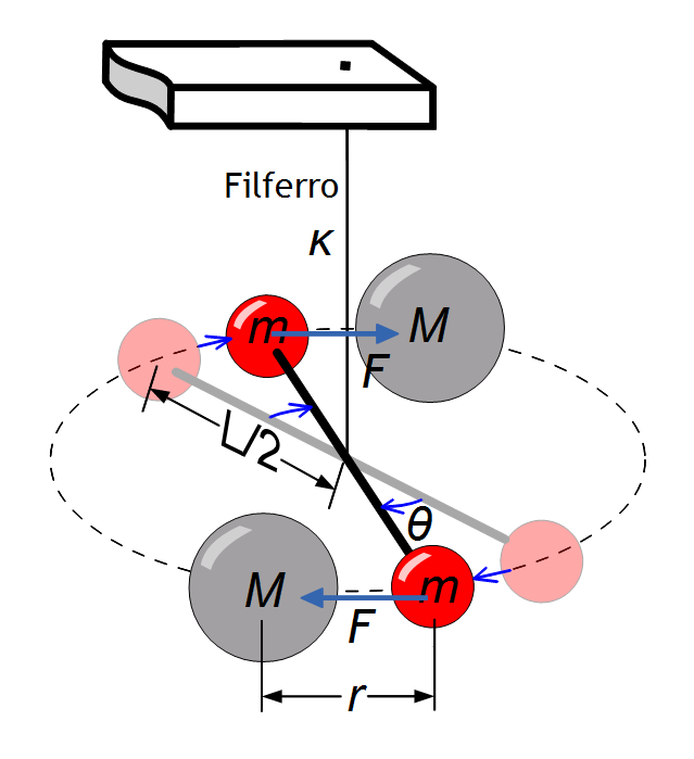 Esquema de la balança de torsió utilitzada en l'experiment realitzat per Henry Cavendish el 1798. Mesurà la força de la gravetat entre les masses M i m, i va obtindre el valor de la densitat mitjana de la Terra. Etiquetes: massa (M) d'esferes de plom estacionaris, (m ) massa d'esferes de plom mòbils, (F) la força gravitacional entre cada parell d'esferes, (\ theta) angle de desviació respecte de la posició d'equilibri, (\ kappa) coeficient de ressort de torsió, (r) distància entre els centres de les esferes una vegada desviades (L) longitud del braç de suport de les esferes mòbils entre els seus centres.